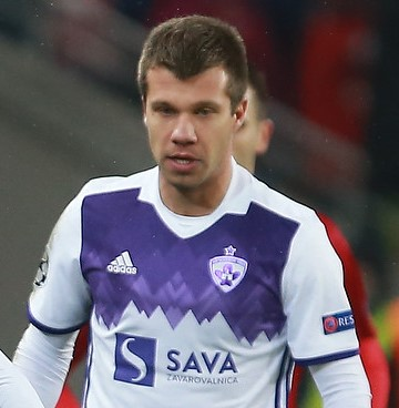 Mitja Viler, Damjan Bohar